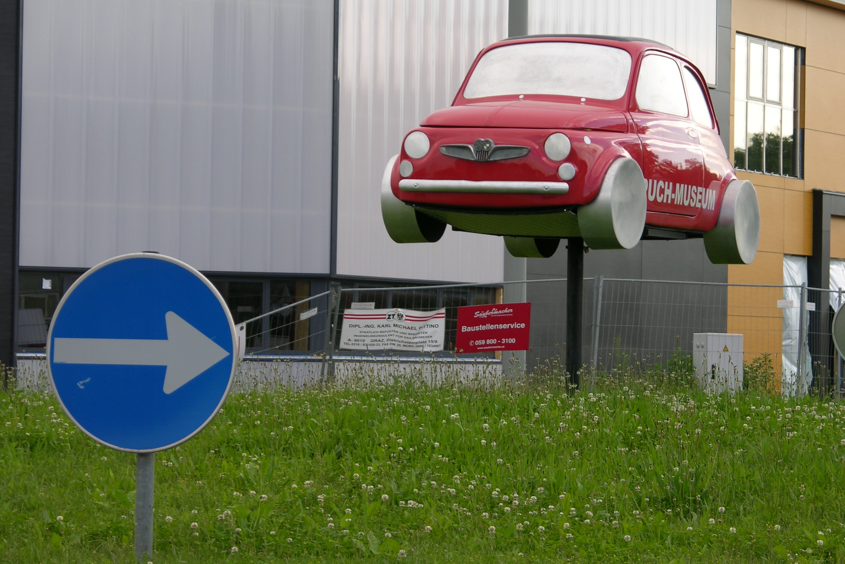 Puch-Wagen als Hinweis auf das Puch Museum in Graz, Puchstraße